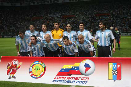 argentina - copa america 2007